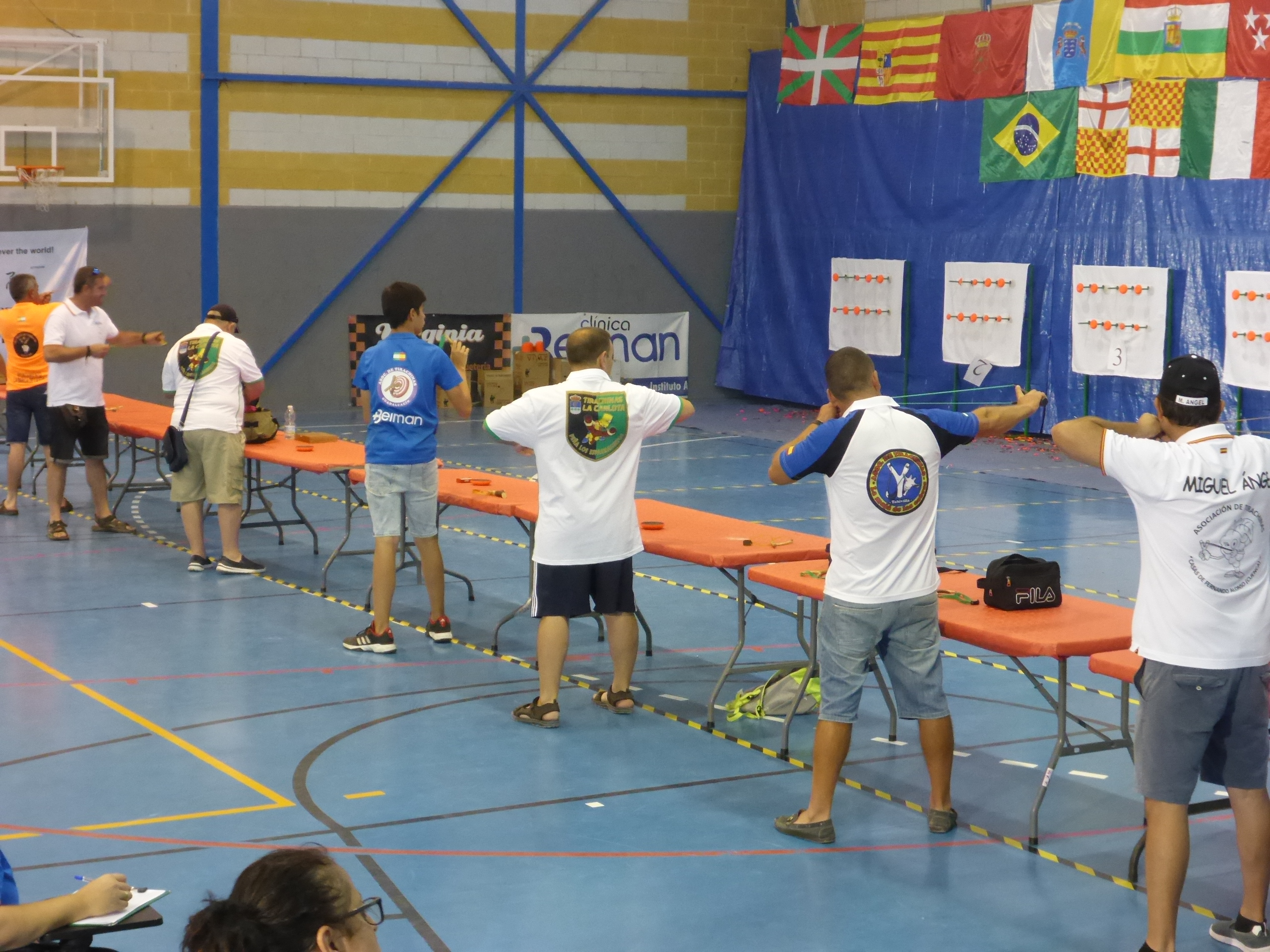 18º Campeonato Nacional de España de Tirachinas en Guadalcacín (Jerez de la Frontera, España)